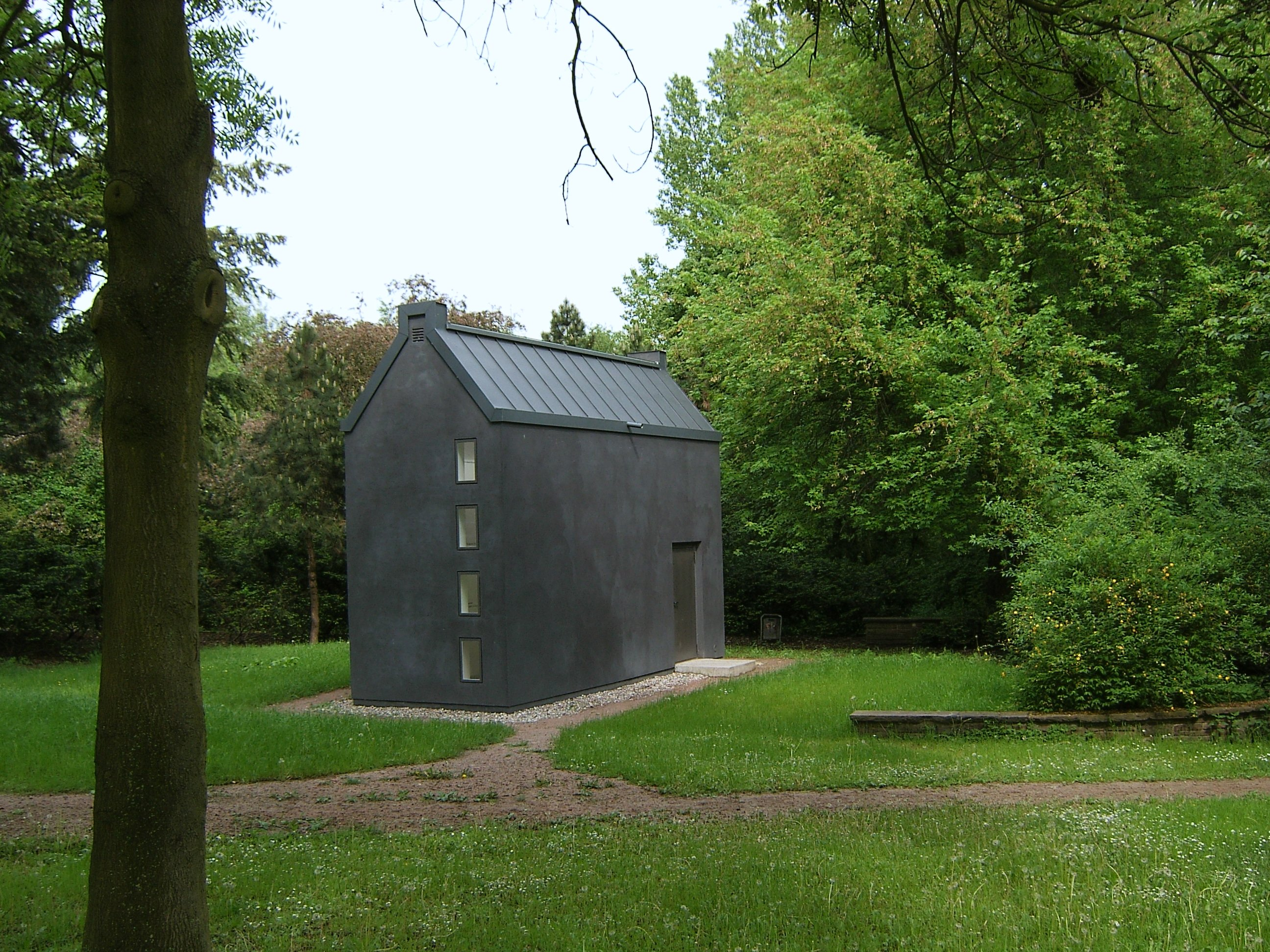 Hamburg, Rothenburgsort, Denkmal "Terassenhaus" von Volker Lang.